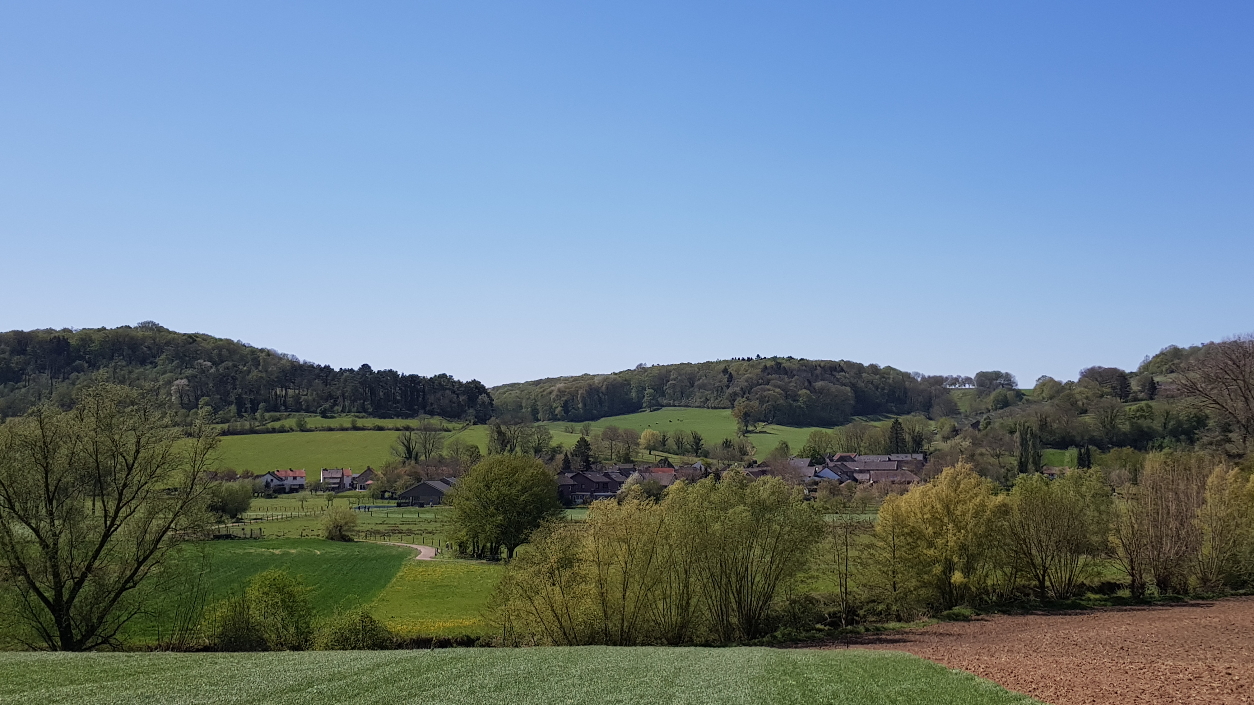 de Abelschegrub bij Stokhem, Wijlre, Gulpen-Wittem, Nederland